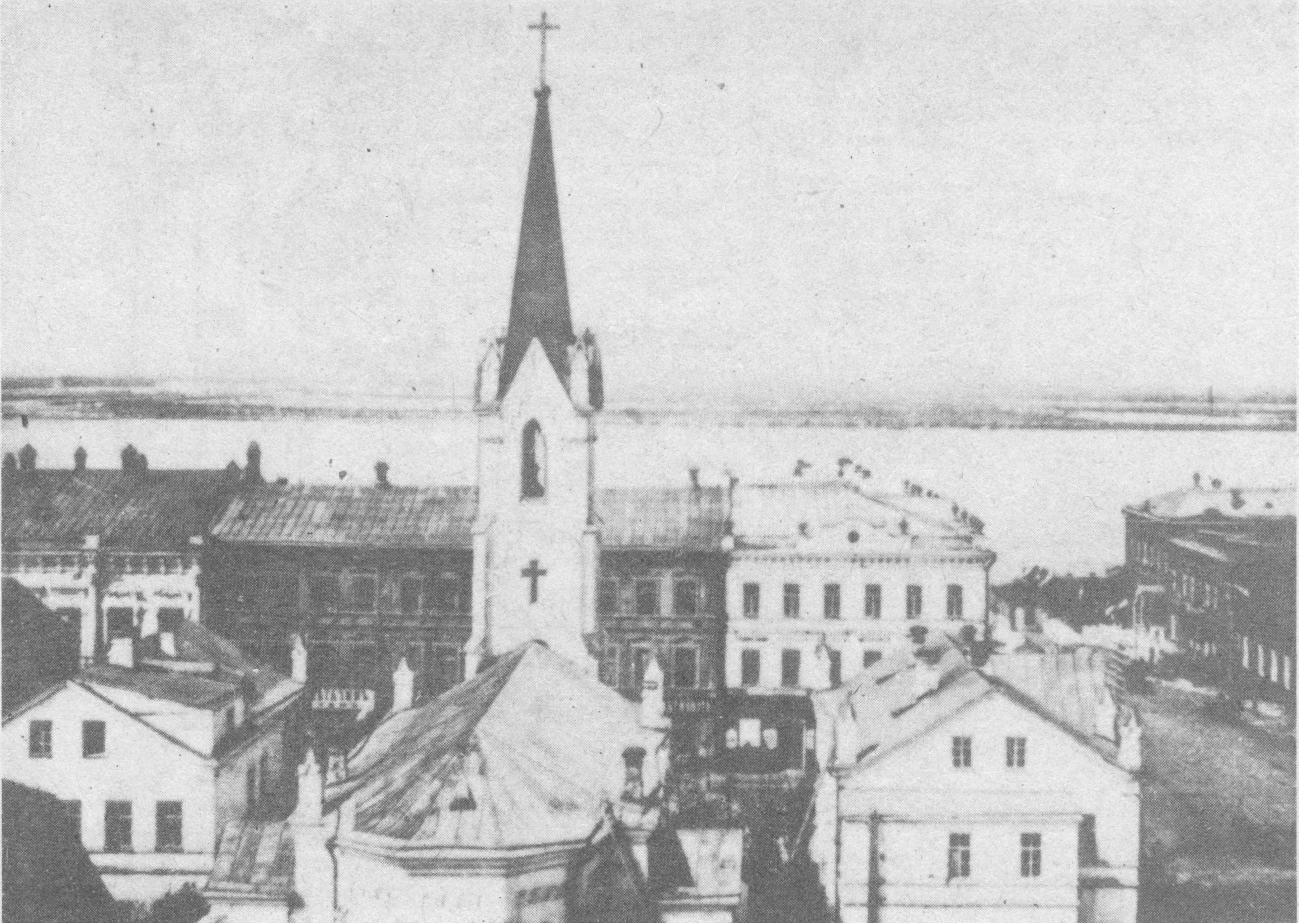 Самарская кирха (лютеранская церковь) в начале XX века. По источнику: Уголок старого города (угол улиц Дворянской и Предтеченской (ныне улиц Куйбышева и Некрасова).